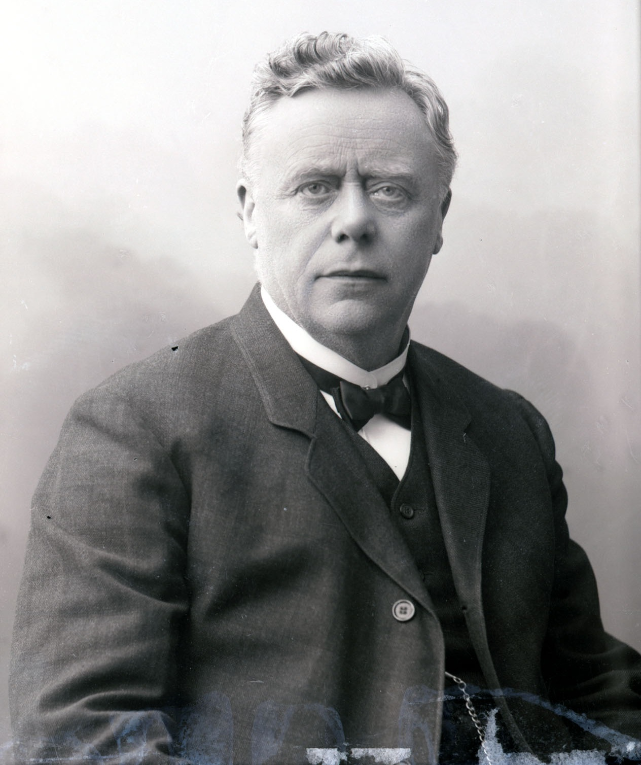 Magnus Halvorsen (1853–1922), kjøpmann og politiker (Venstre/Frisinnede Venstre).